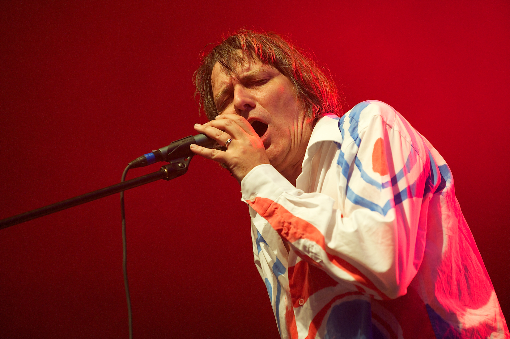 Foto von Peter Hein (Fehlfarben) - aufgenommen am 07.08.2010 beim Hafensommer Würzburg